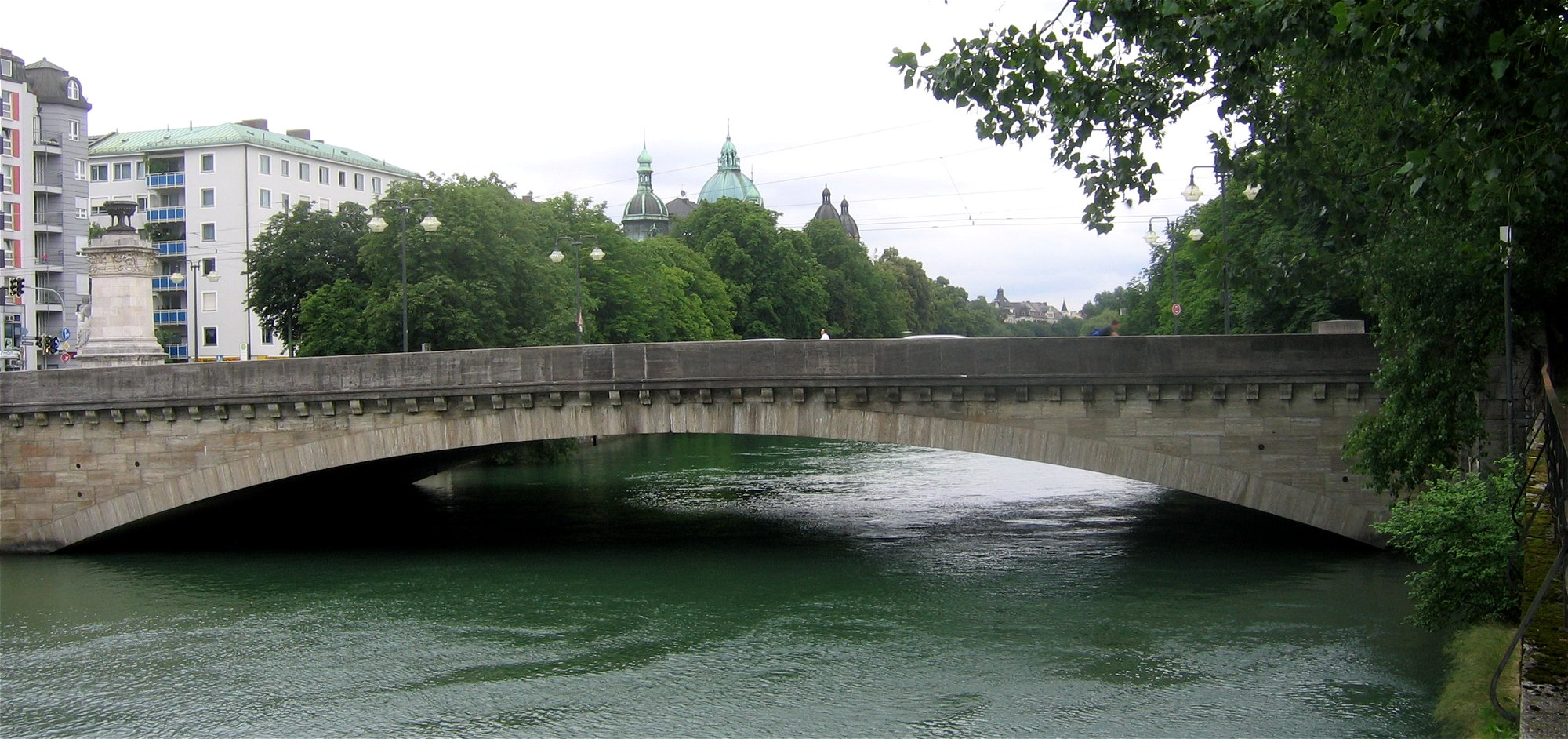 Ludwigsbrücke Westseite, München